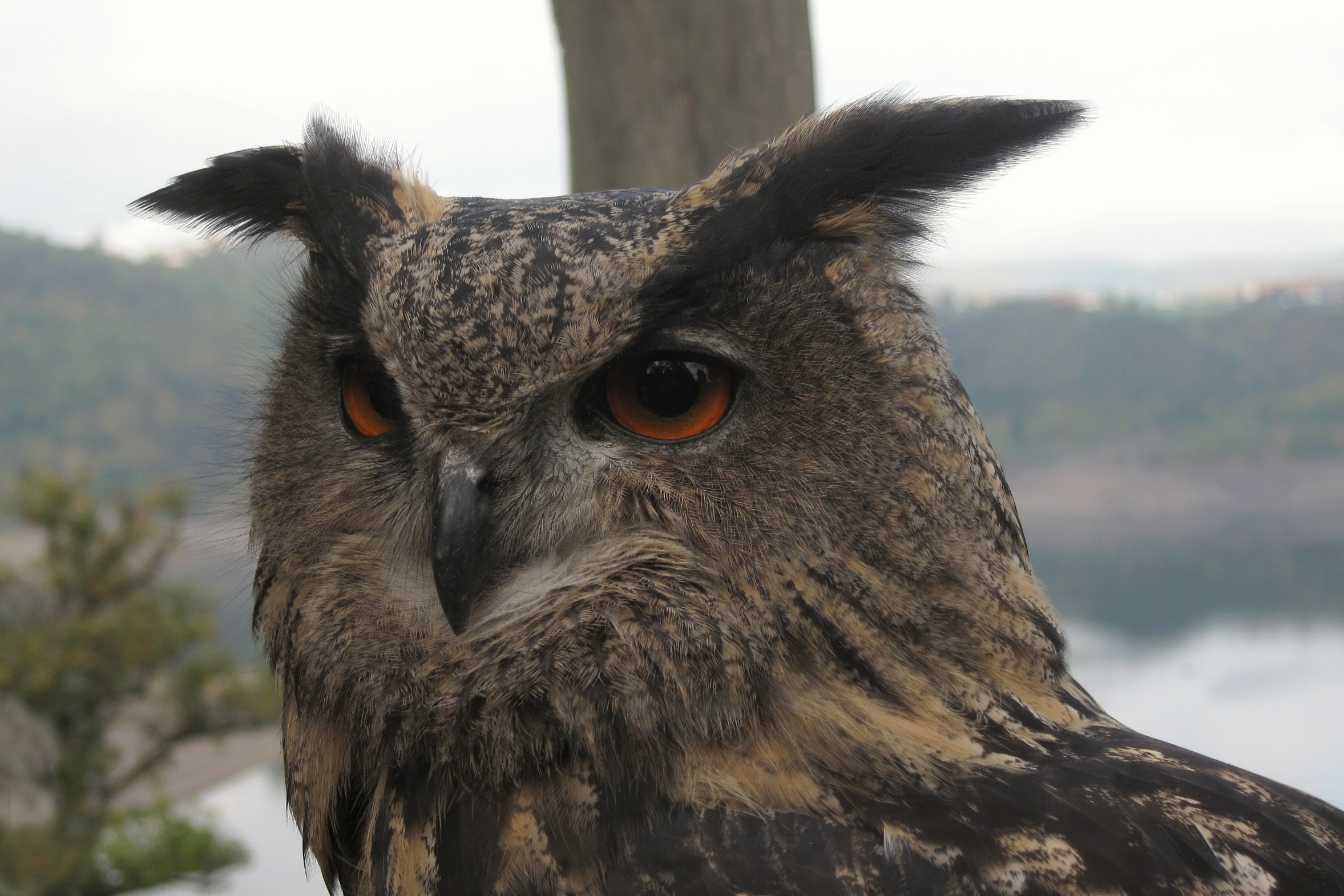 Uhu bei einer Flugvorführung der Greifenwarte Wildpark Edersee.